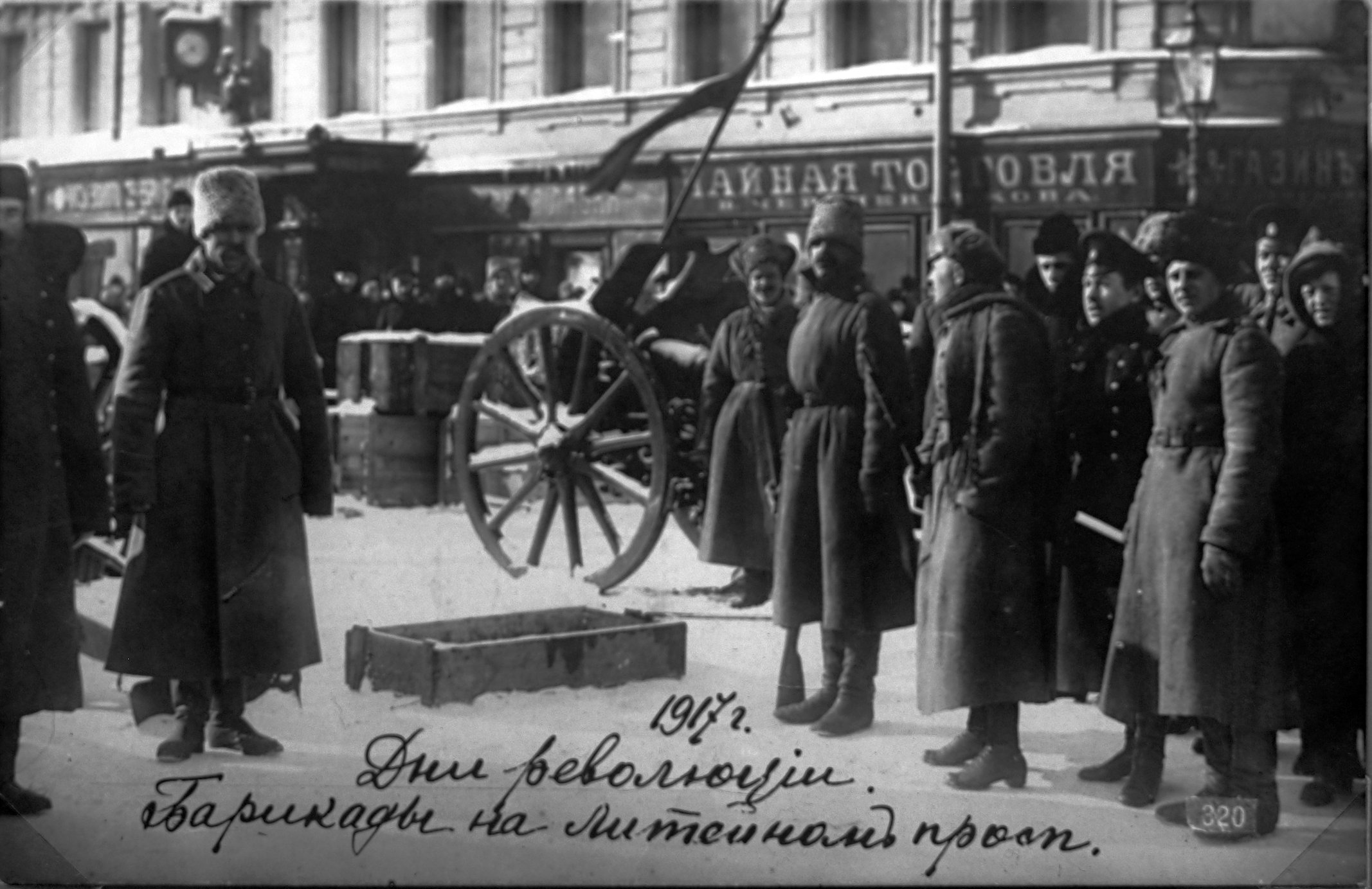 Баррикады на Литейном проспекте во время февральской революции. Открытка, изданная после февральской революции